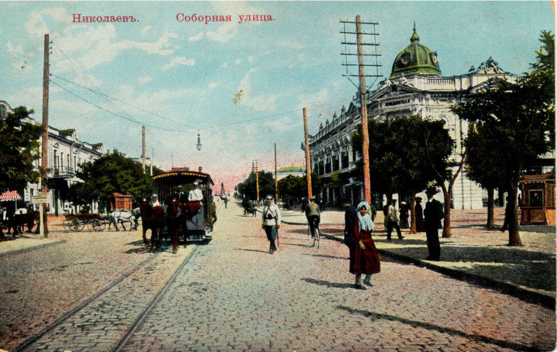 «Николаевъ. Соборная улица.» (Лондонская гостиница)